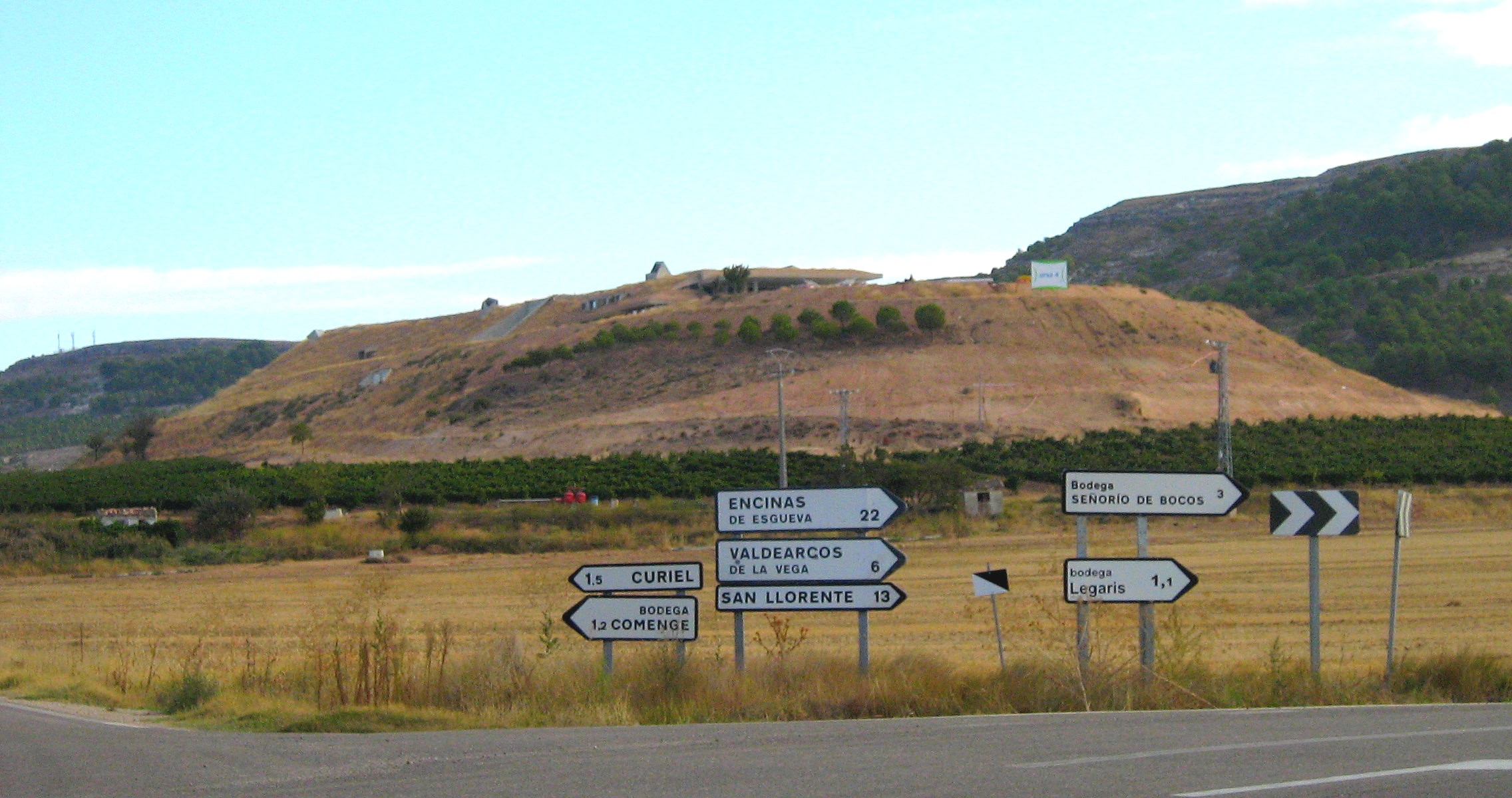 Curiel de Duero. Bodega entrecastillos (en construcción). Valle del Cuco. Provincia de Valladolid. VP-3017